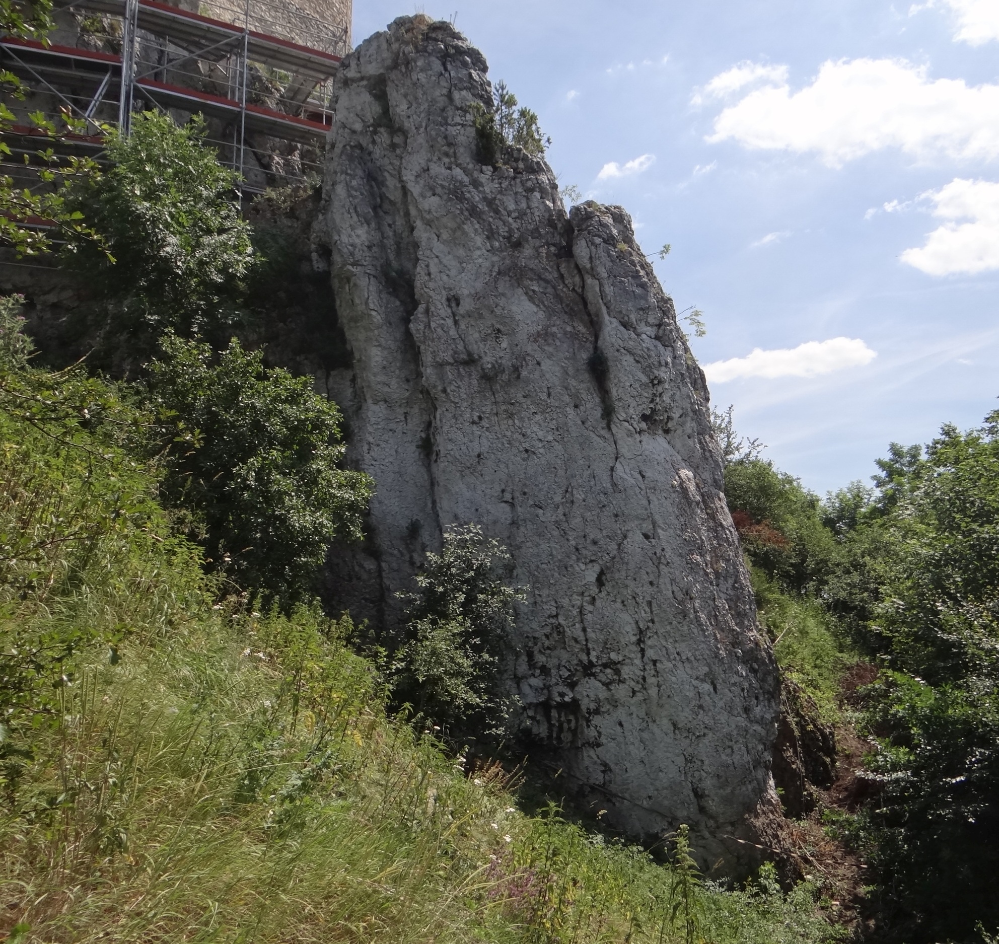 Jedna ze skał Przedmurza na Zamku w Rabsztynie